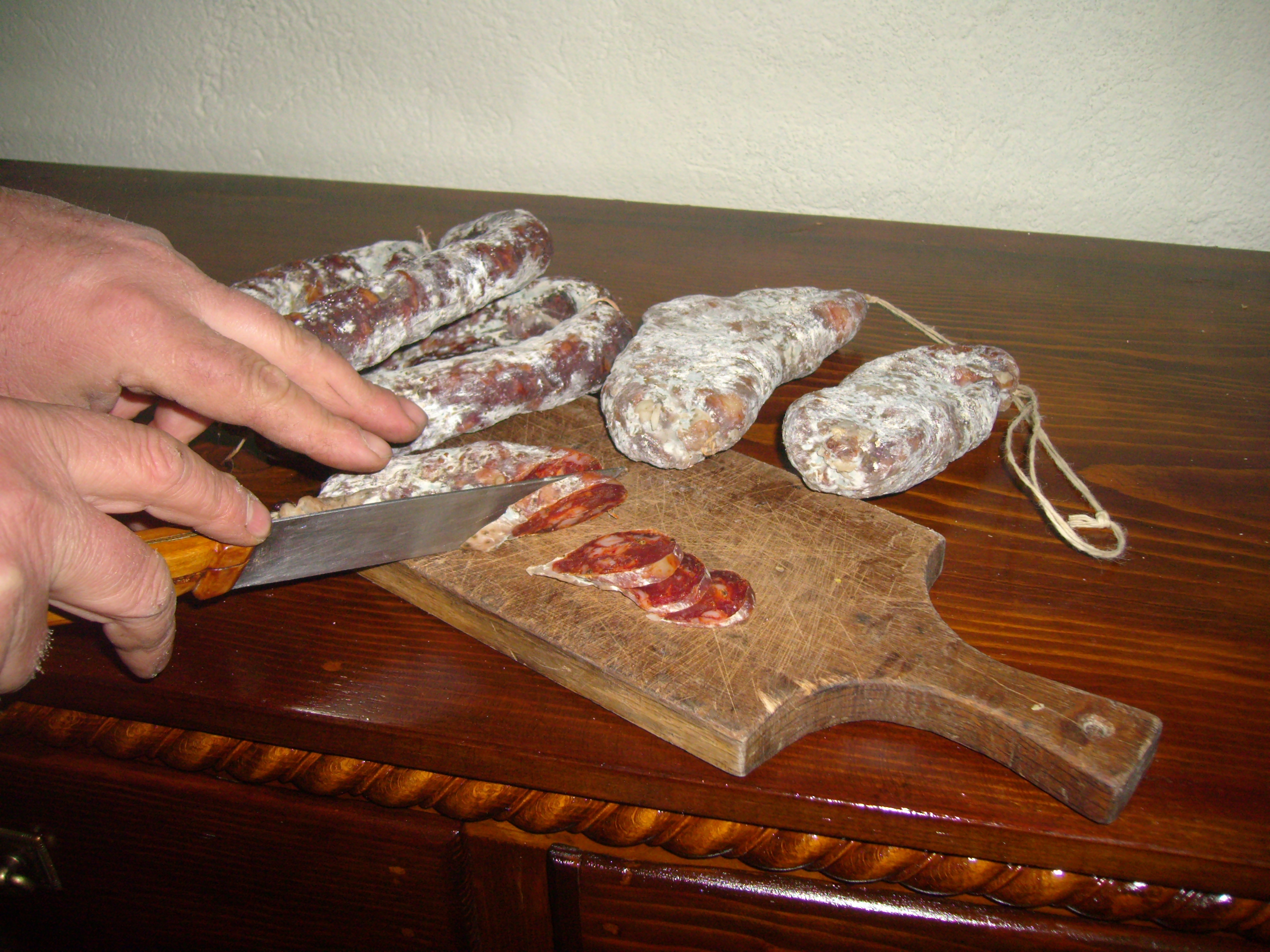 Salame crudo di Albidona